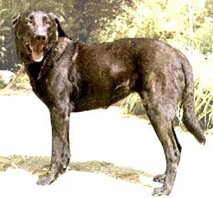 Portuguese dog breed. Cão de Castro Laboreiro